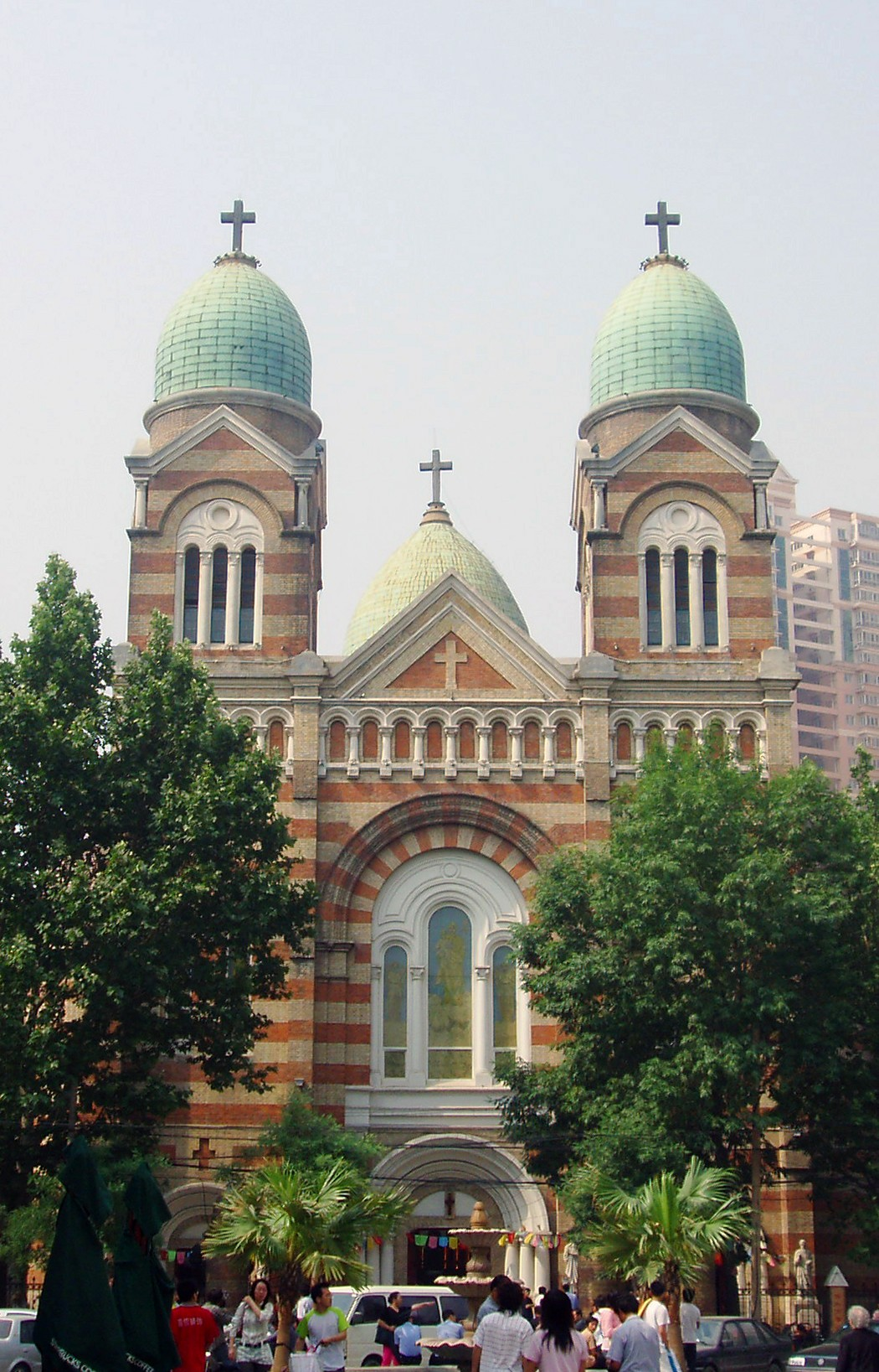 Xikai Cathedral in Tianjin，China